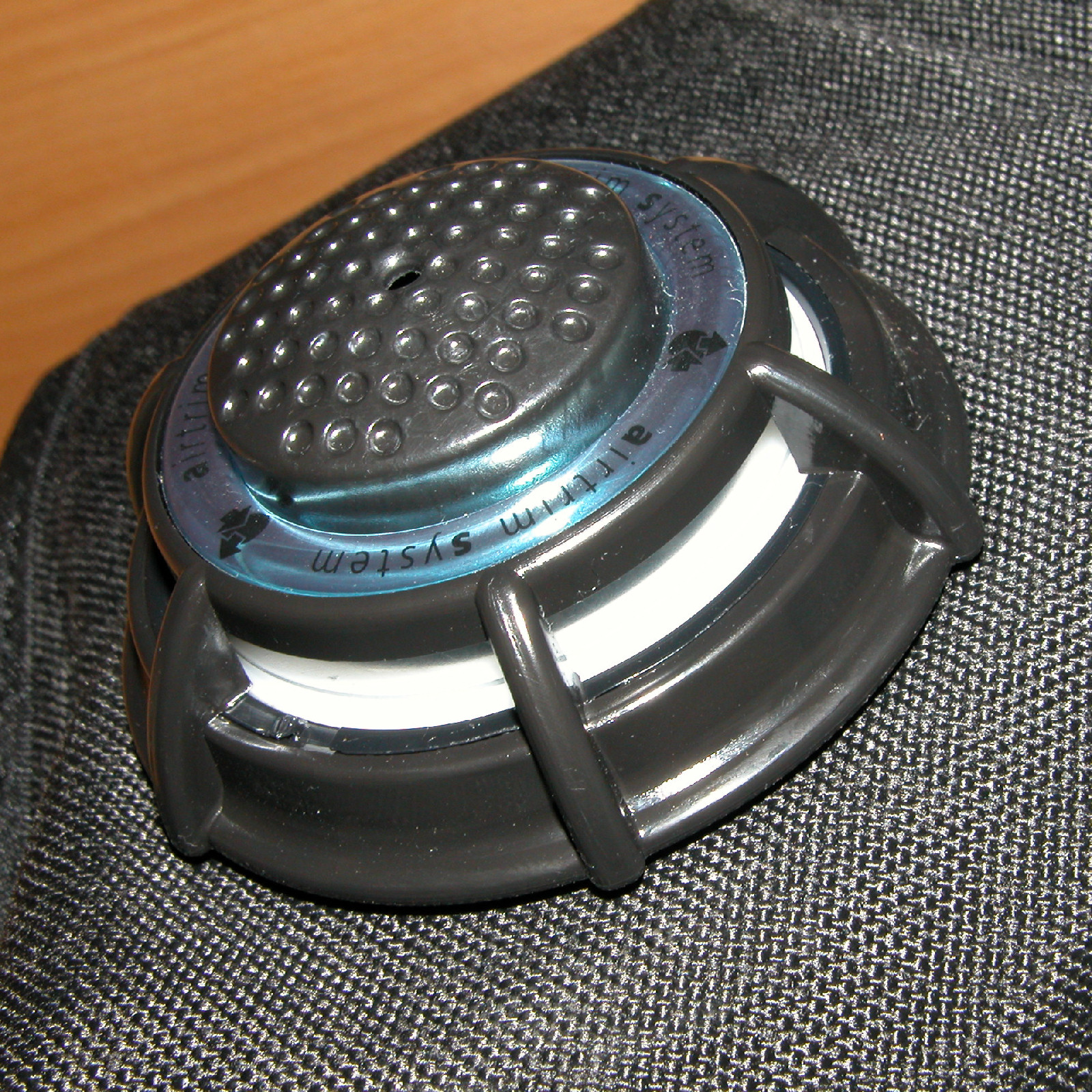 Buoyancy compensator detail: exhaust valve